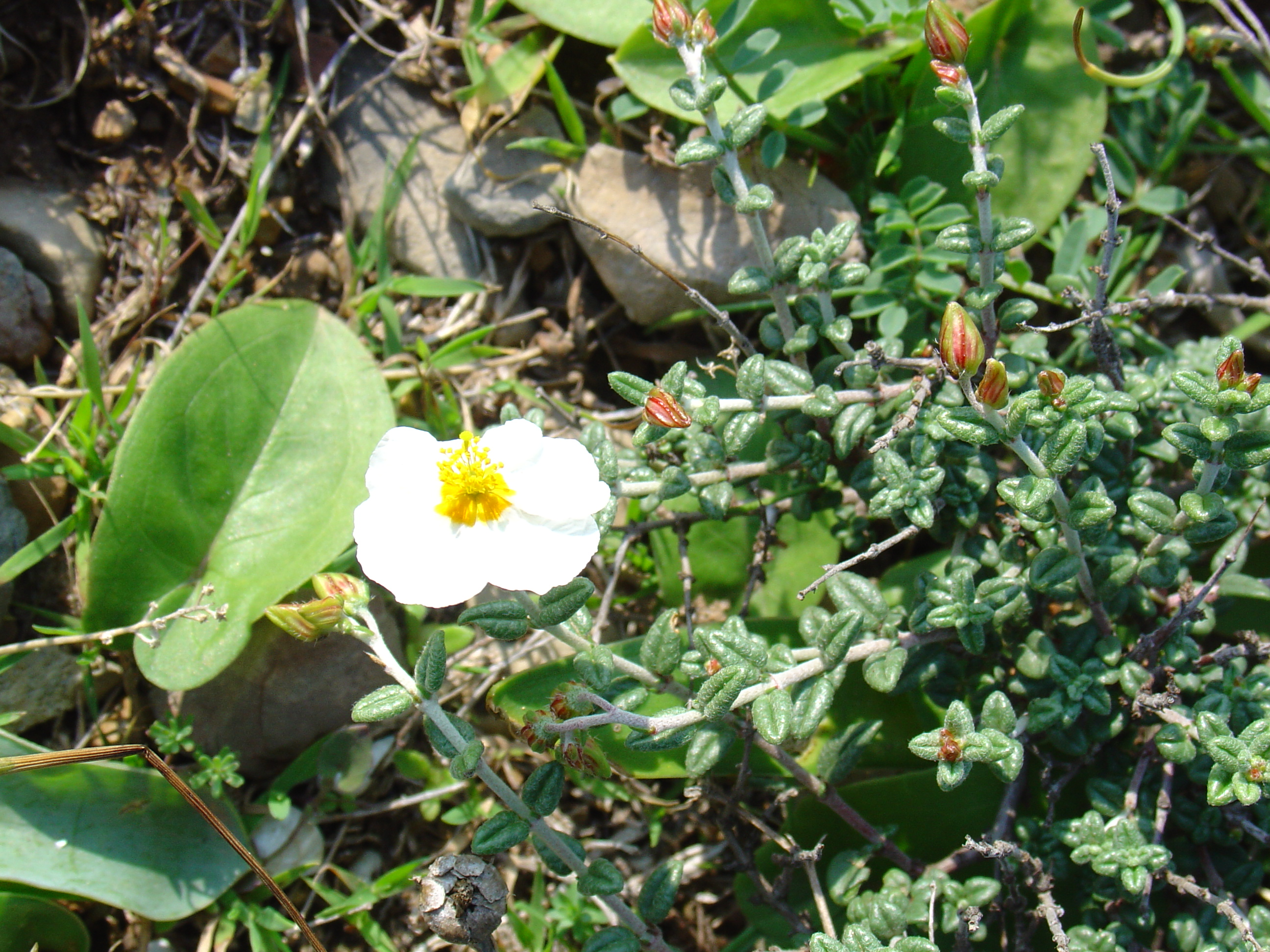 Helianthemum almeriense from Cabo de Palos, Murcia, Spain